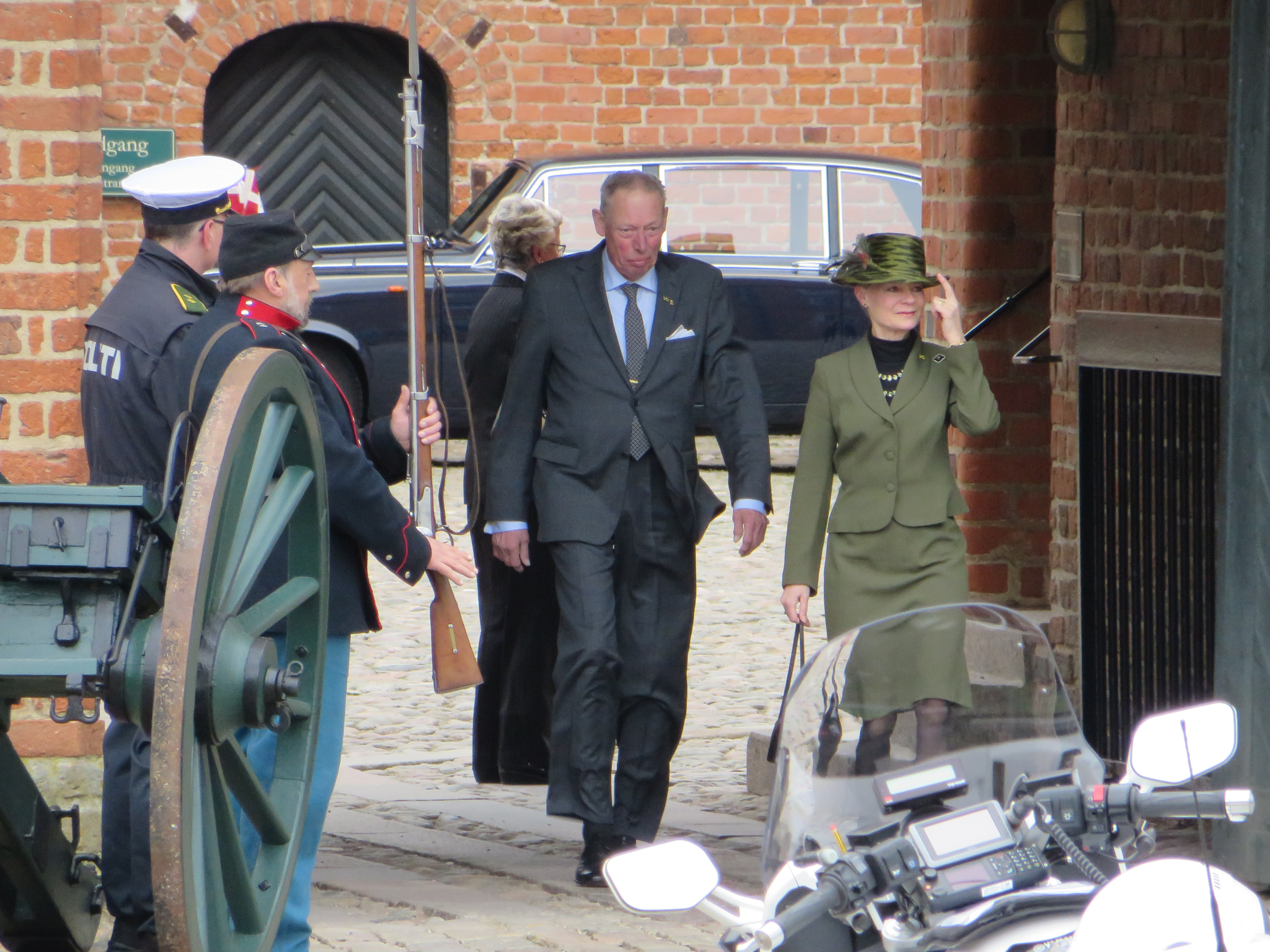 Ingolf von Rosenborg mit Gattin (Sussie von Rosenborg) beim Sonderburger Schloss am 18. April 2014